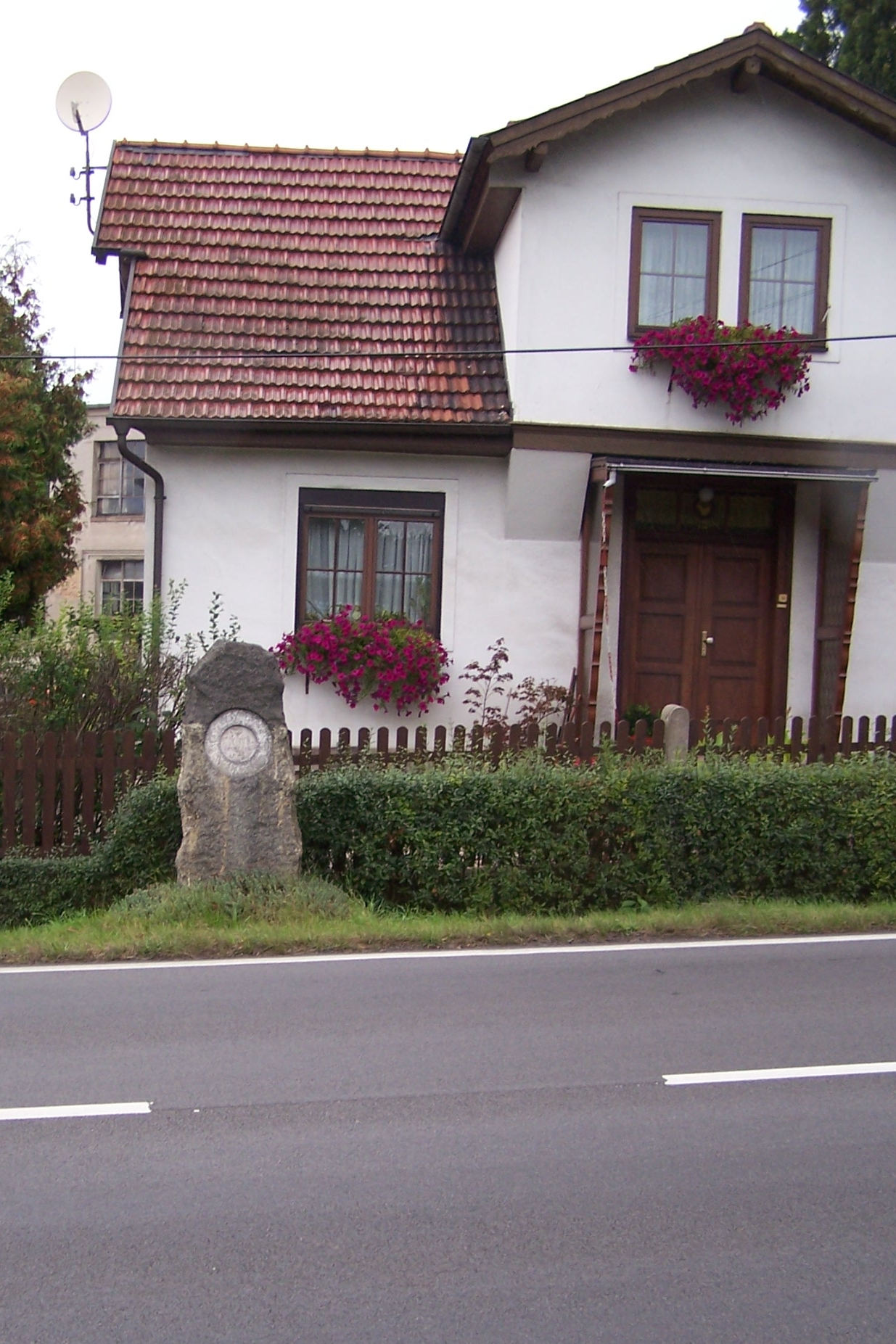 Am ehemaligen Zollhaus an der Liebensteiner Straße - davor ein Grenzstein des Königreichs Preußen an der Barchfelder Flurgrenze.